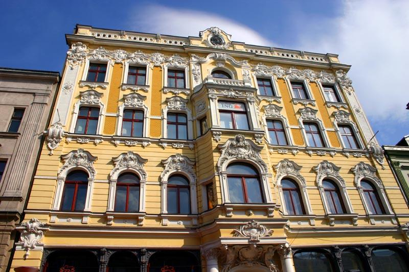 90 Piotrkowska Street, Lodz, Poland